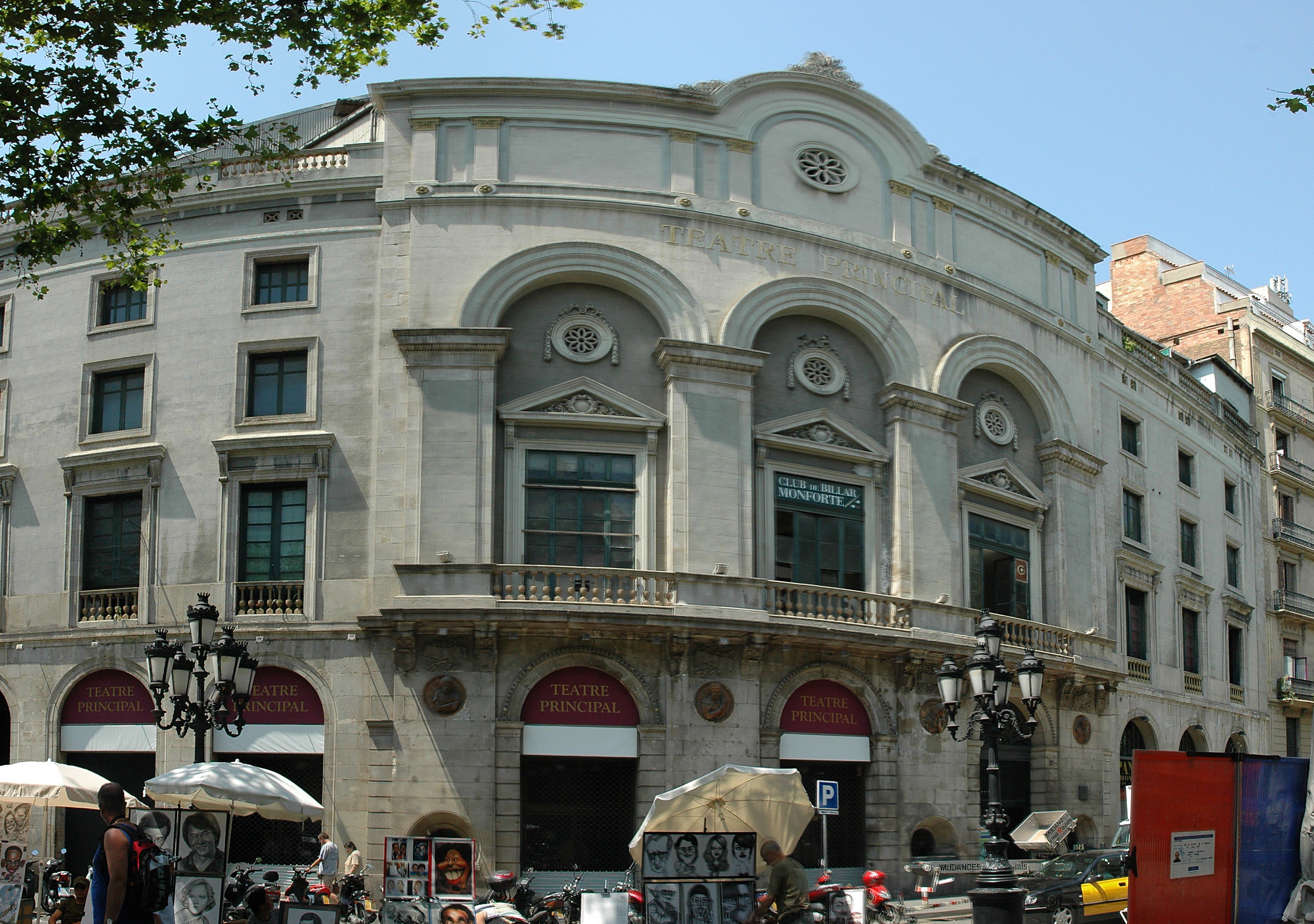 Barcelona - Teatre Principal